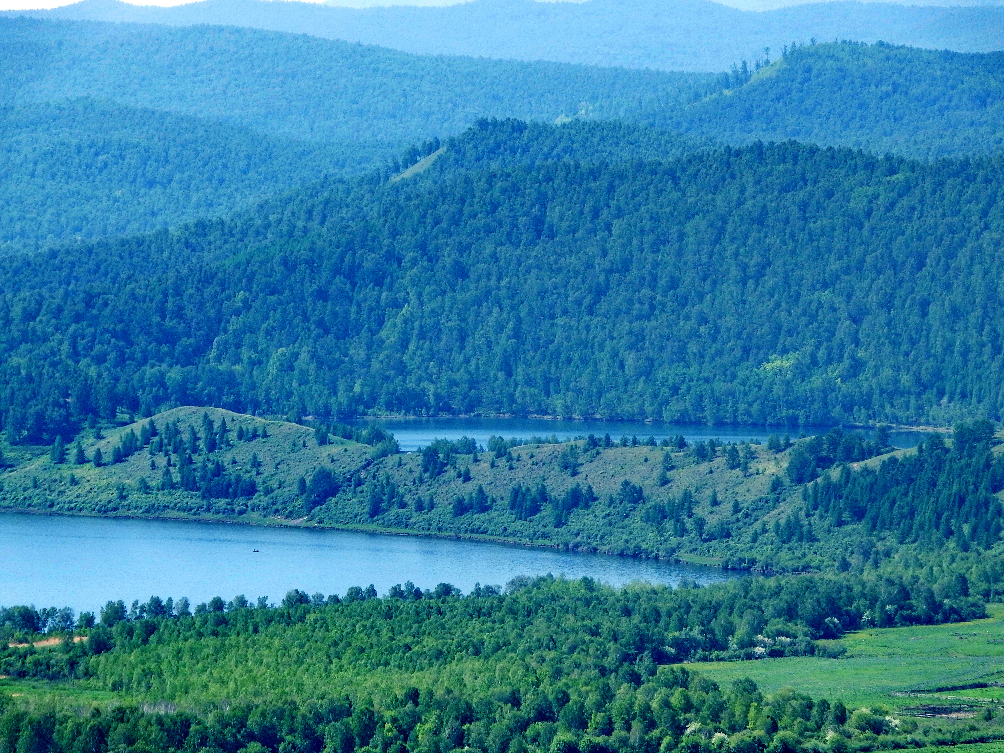 Озеро Круглое: Уярский район, Красноярский край This image is related to the protected area of Russia number 2410206